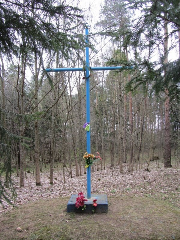 Заастравечча. Крыж паўстанцам 1863-64 гг. паміж вв. Заастравечча і Узнога